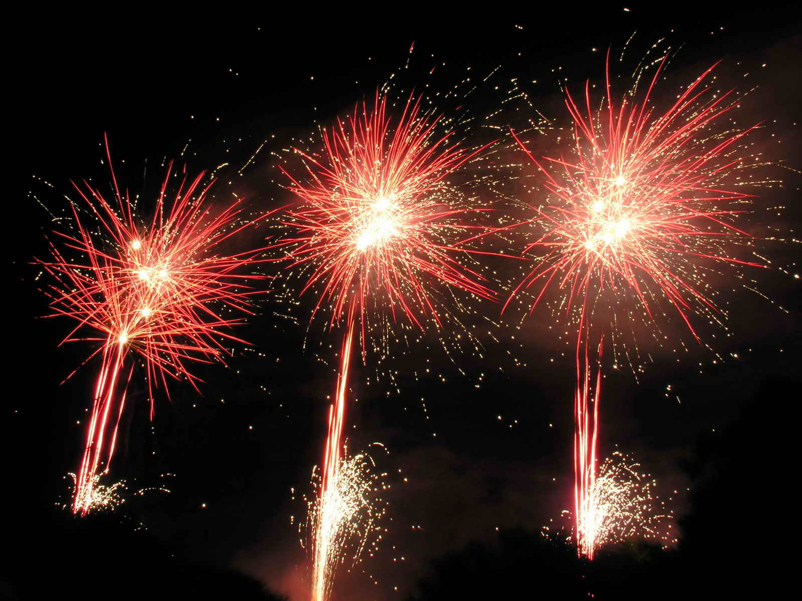 Foto tirada cunha Nikon E8800